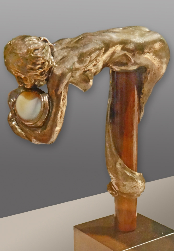 Poignée de canne 1904 Oeuvre de François-Rupert Carabin (1882-1952) Argent, agate et bois d'amarante Collection du Musée du Petit Palais, Paris